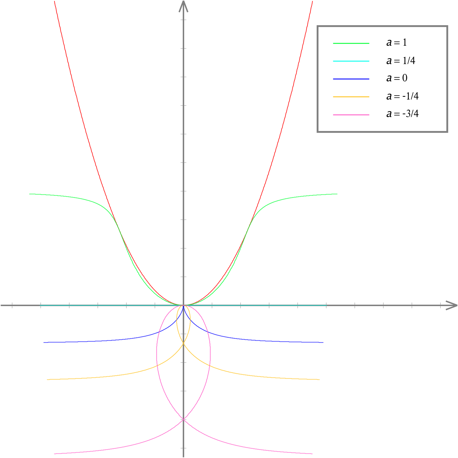 Podaria della parabola di equazione y=x² (in rosso) e polo P(0,a) (in vari colori, per diversi valori di a). Podaria of a parabola with equation y=x² (red line) with pole P(0,a) (in different colors, according to various values of a).